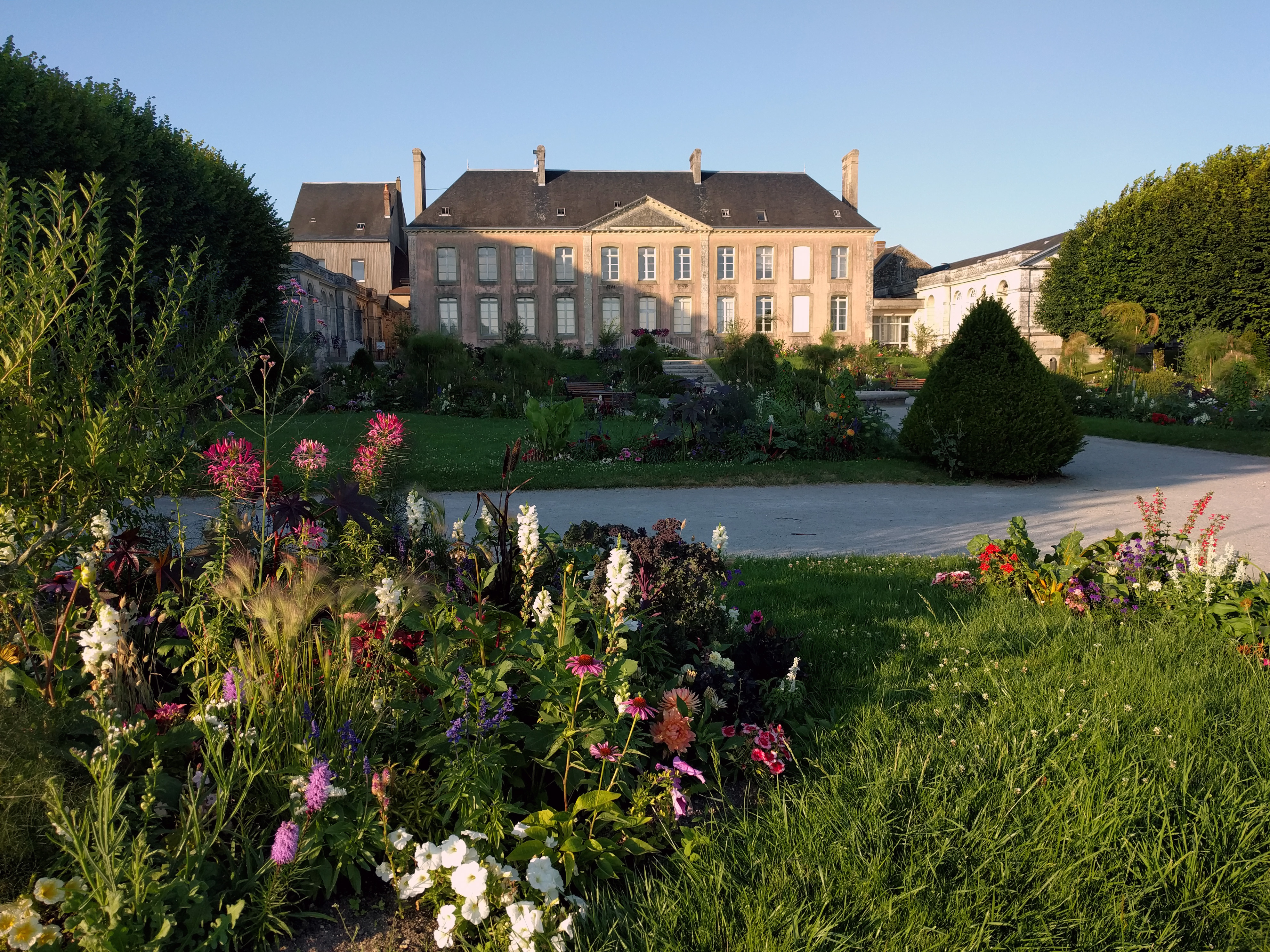 Ayuntamiento de Mortagne-au-Perche, Normandía